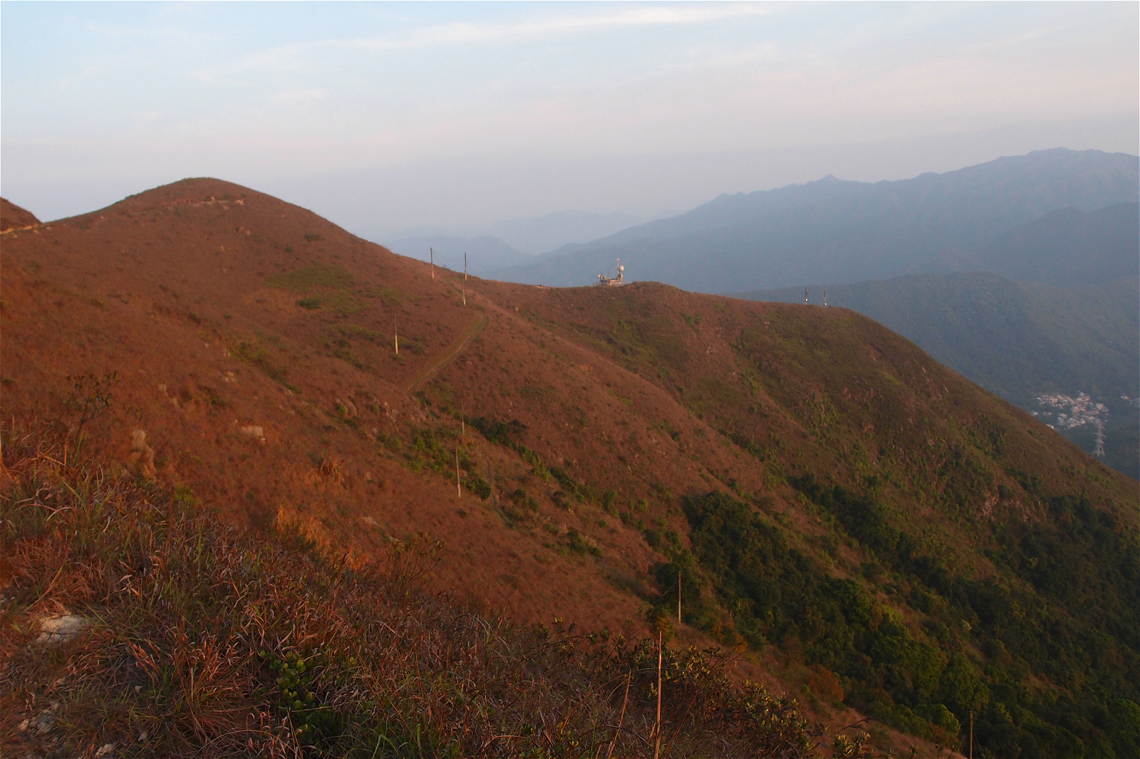 中文（香港）: 紅花嶺的西面